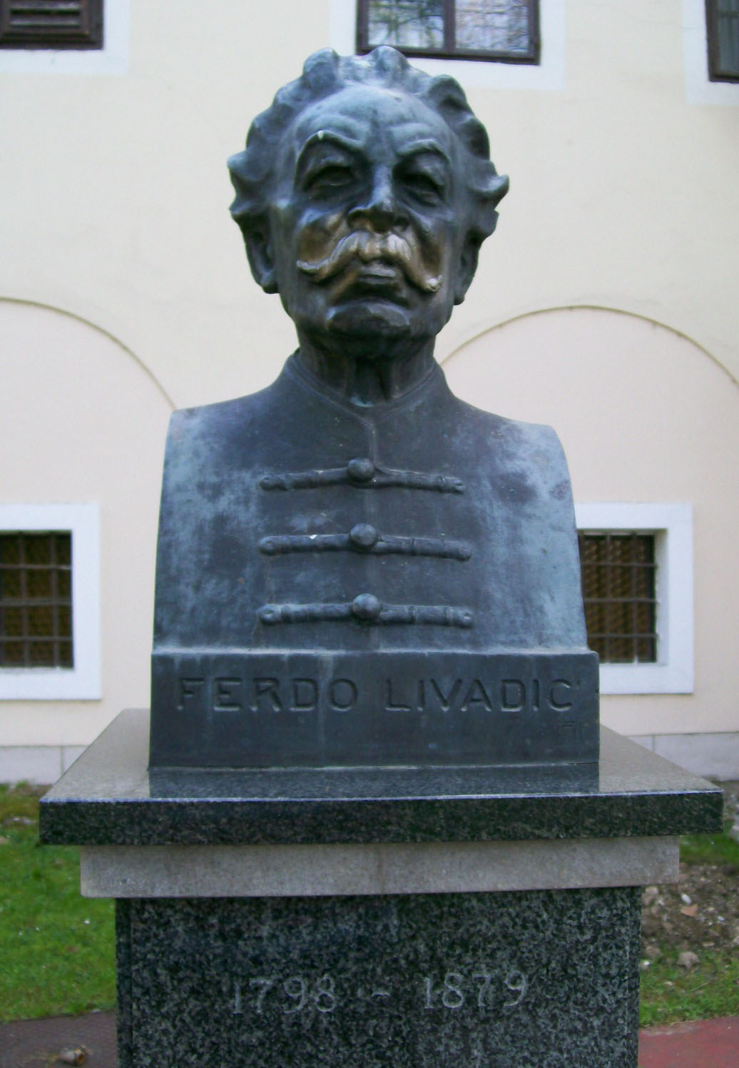 Spomenik Ferdi Livadiću u Samoboru